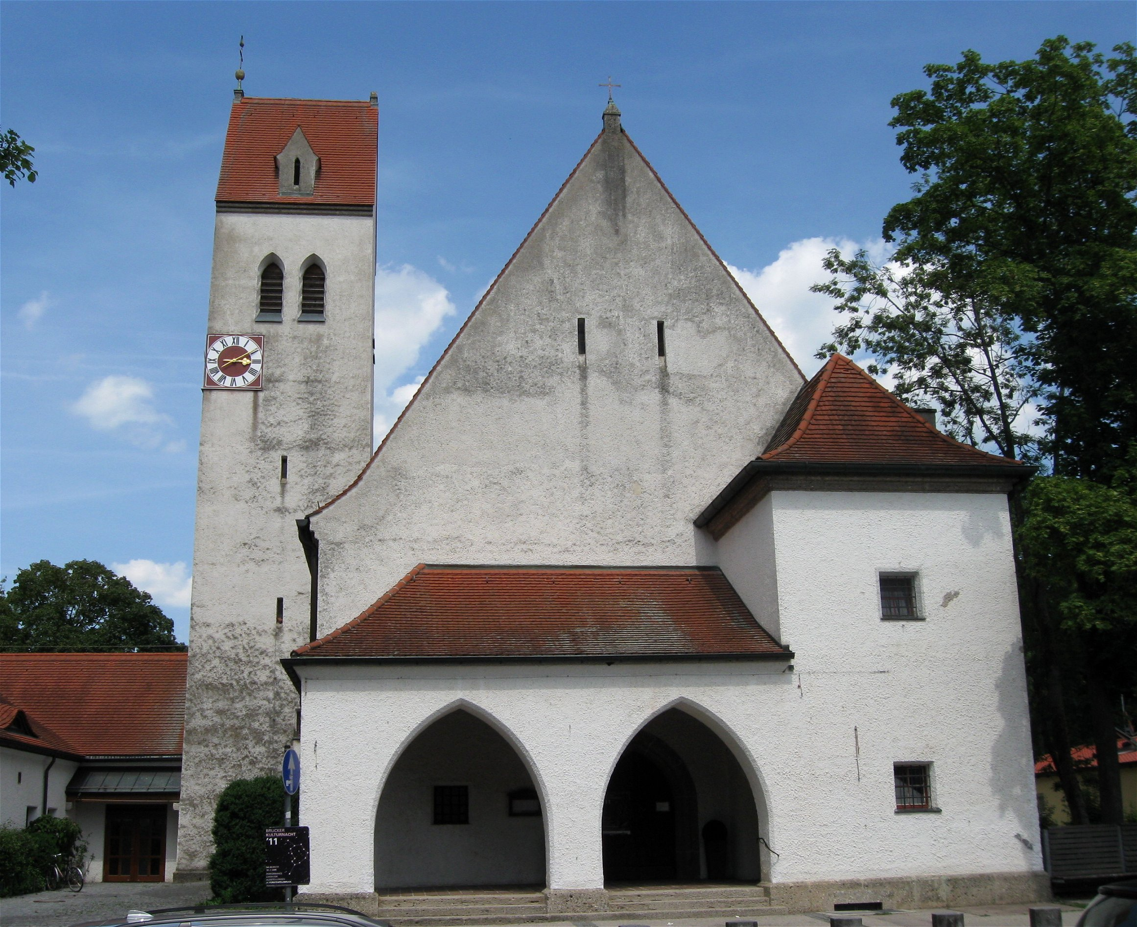 Stockmeierweg 7. Evang.-Luth. Erlöserkirche, 1925/27 von German Bestelmeyer erbaut.